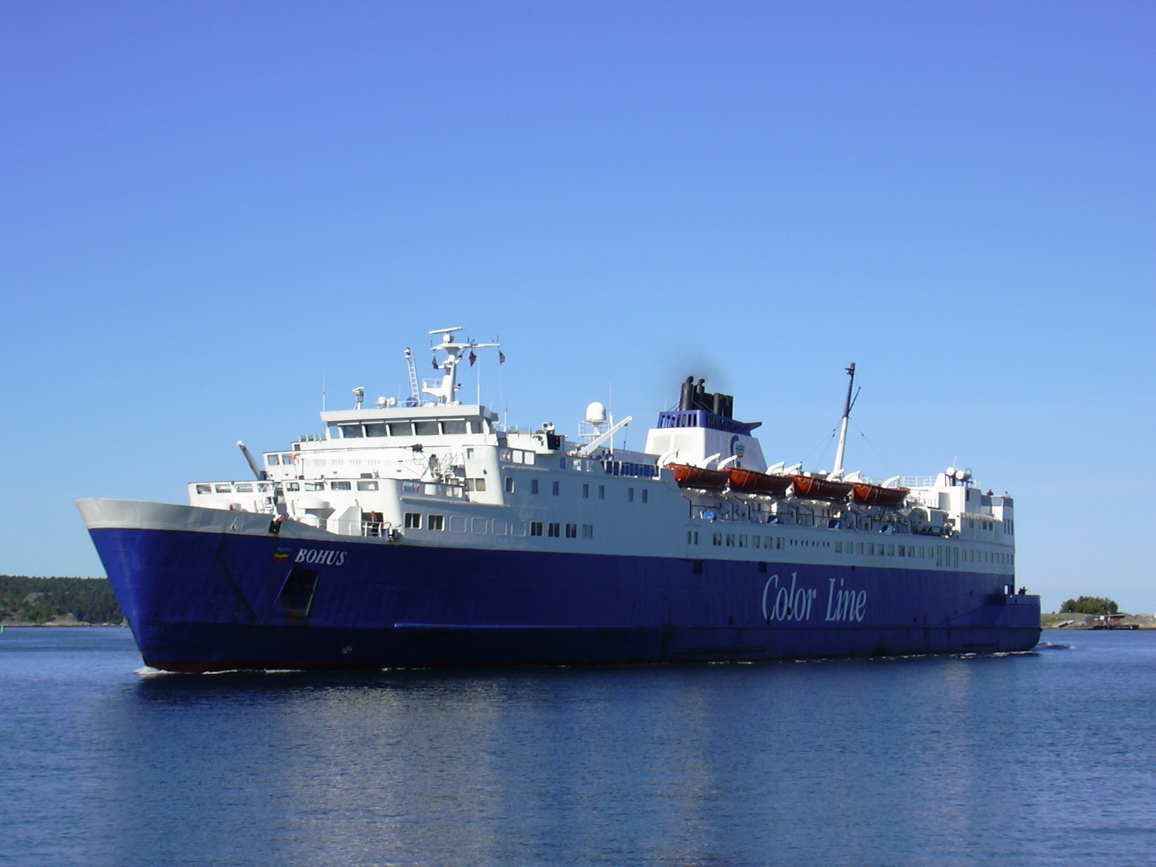 Color Bohus vid terminalen Strömstad